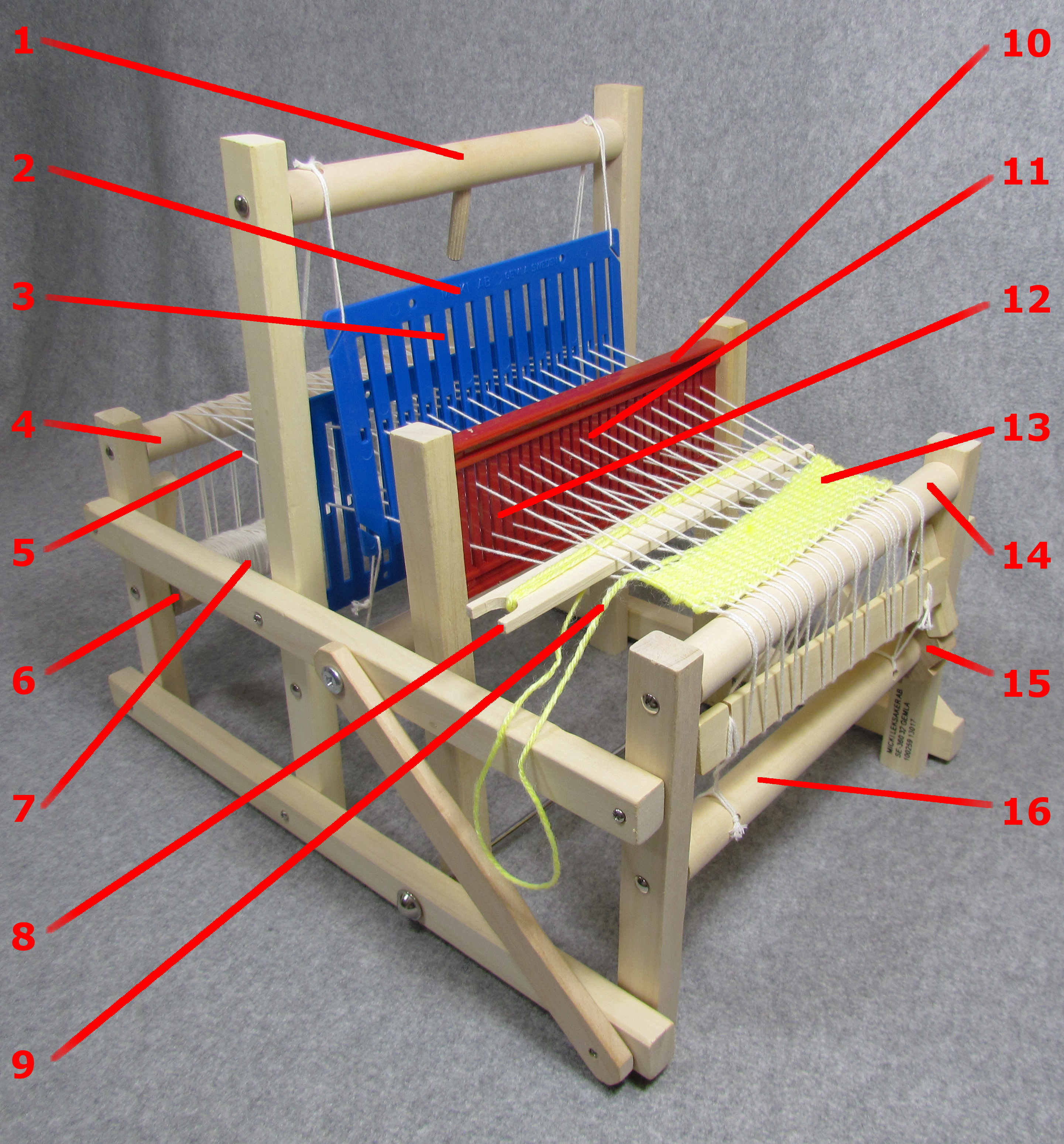 Bildinhalt: Kinderwebstuhl aus Holz und Plastik. Hintergrund grau. Aufnahmeort: Baden-Baden, Deutschland Einzelteile: 1 - Fachreguliervorrichtung 2 - Litzenstock 3 - Litze mit Öhr 4 - Streichbaum 5 - Kettfaden 6 - Sperrad 7 - Kettbaum 8 - Weberschiffchen 9 - Schussfaden 10 - Lade 11 - Kamm 12 - Fach 13 - Gewebe 14 - Brustbaum 15 - Sperrad 16 - Warenbaum